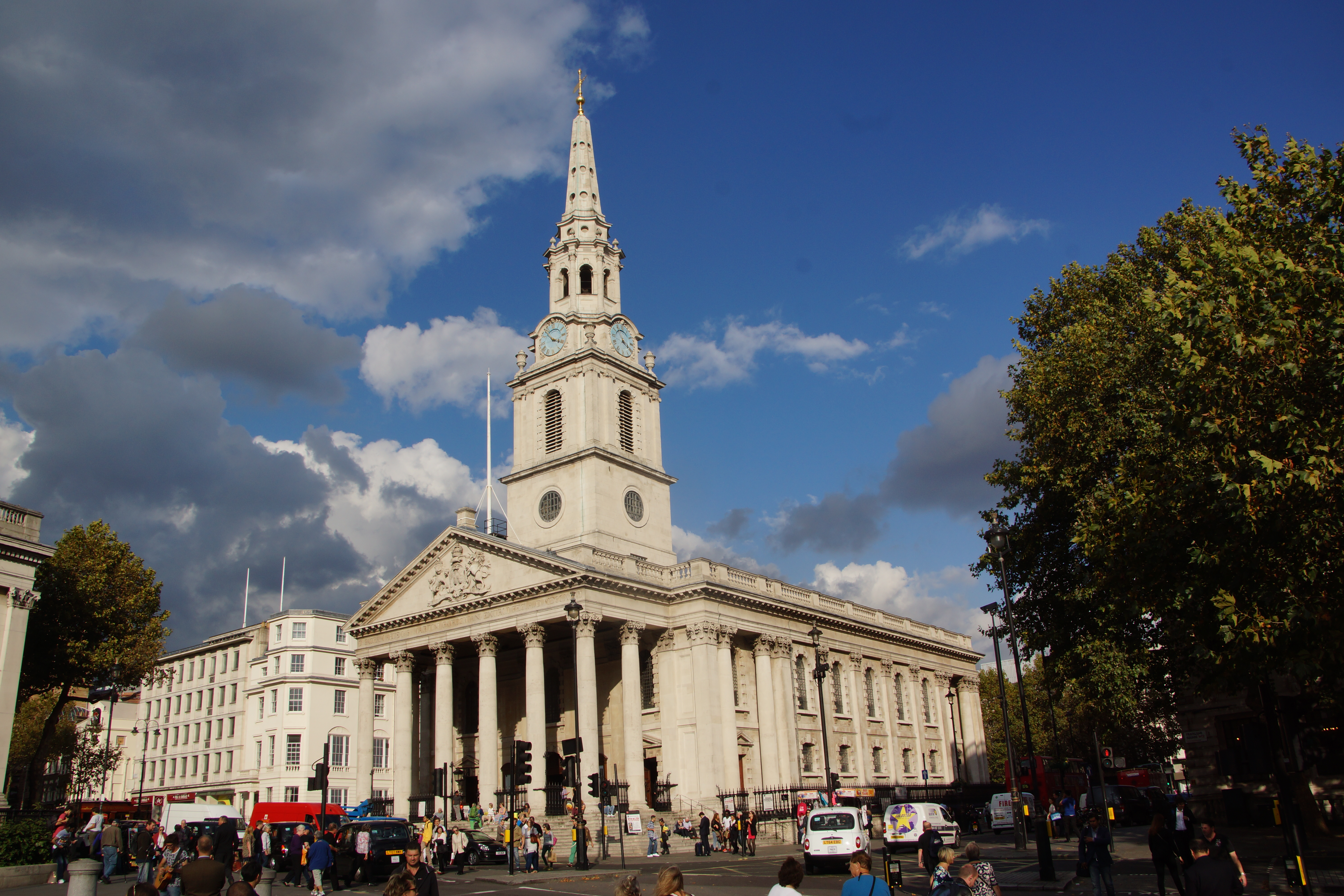 Statue St Martin-in-the-Fields Trafalgar Square in London